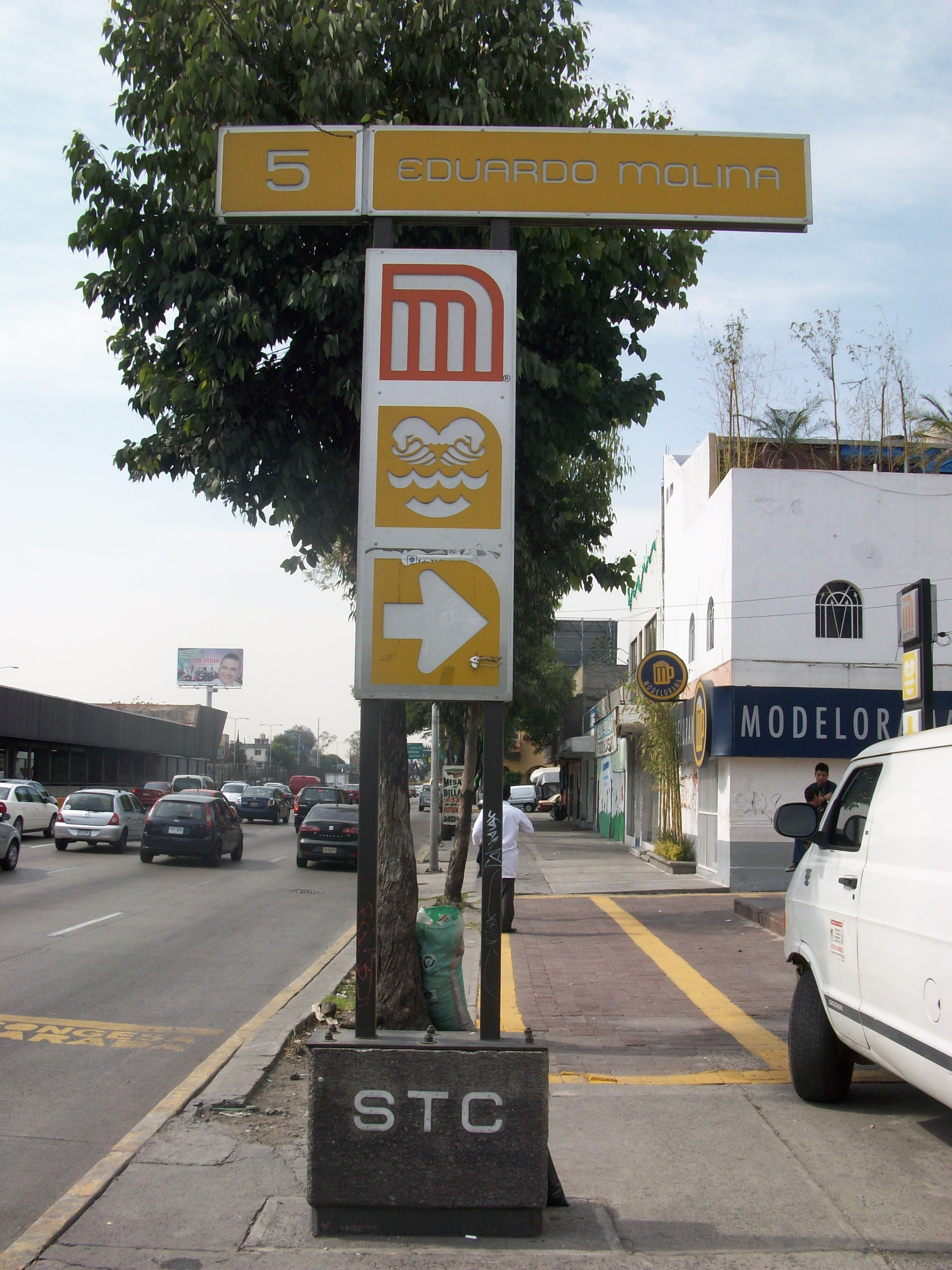 Estela de la estacion Eduardo Molina